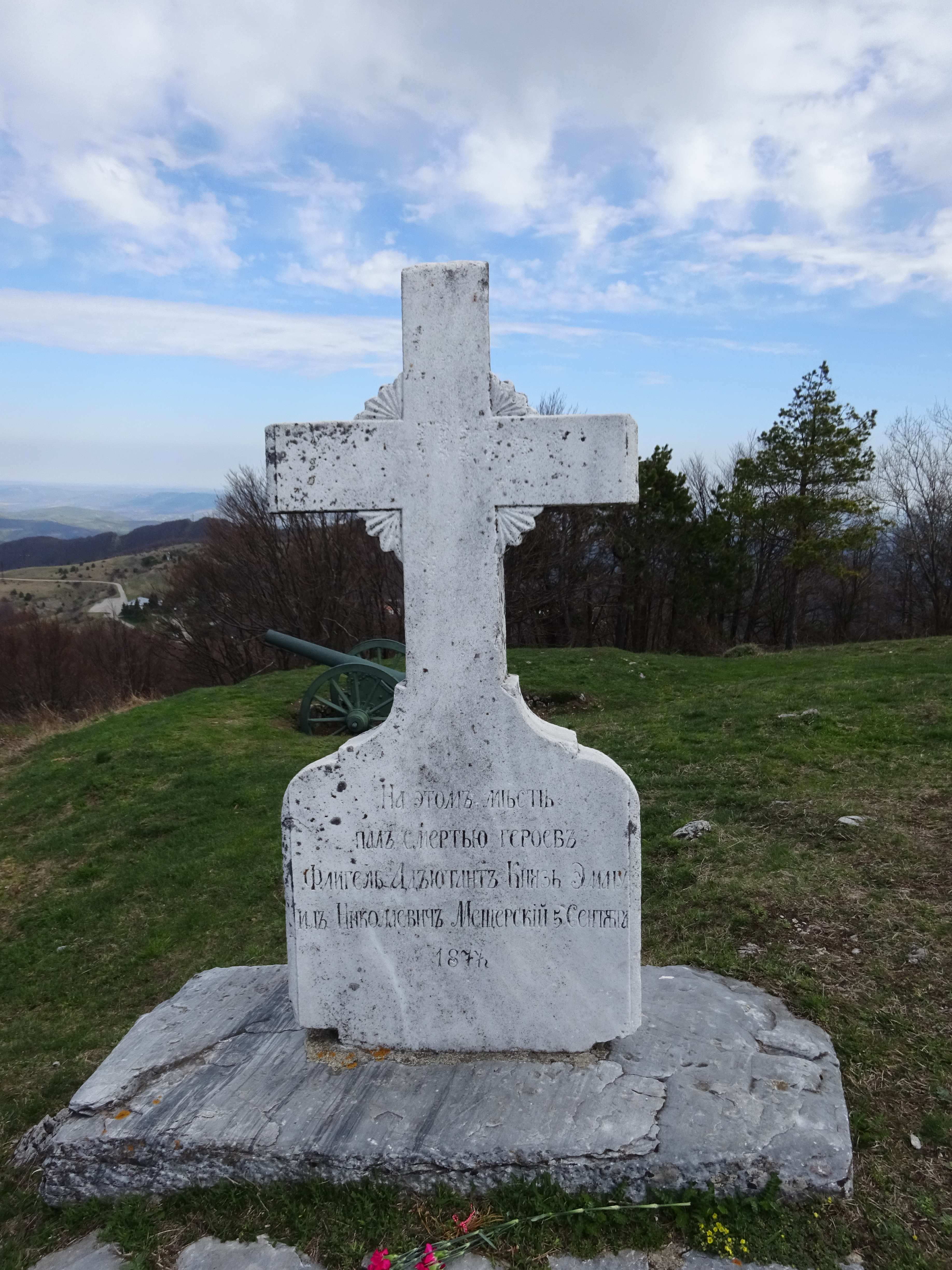 Възпоменателен кръст на княз Мещерски край Шипка